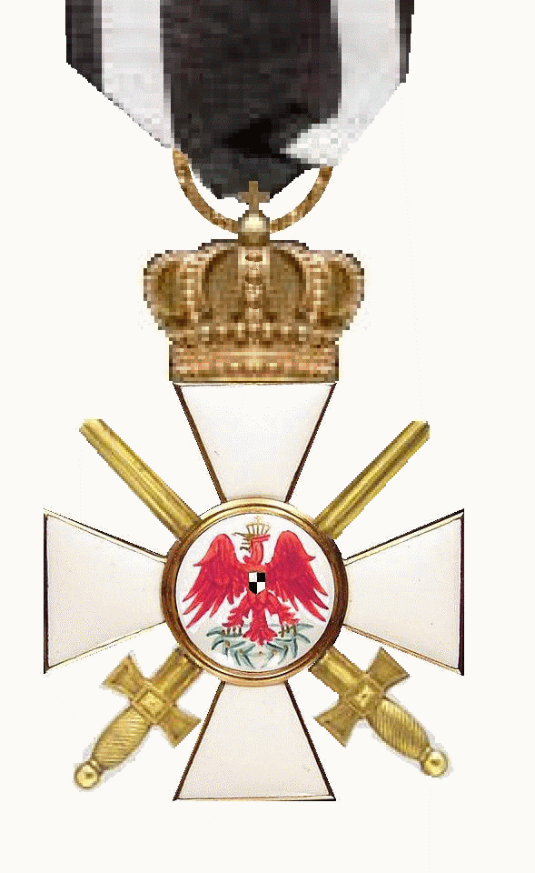 Roter Adlerorden mit Schwertern